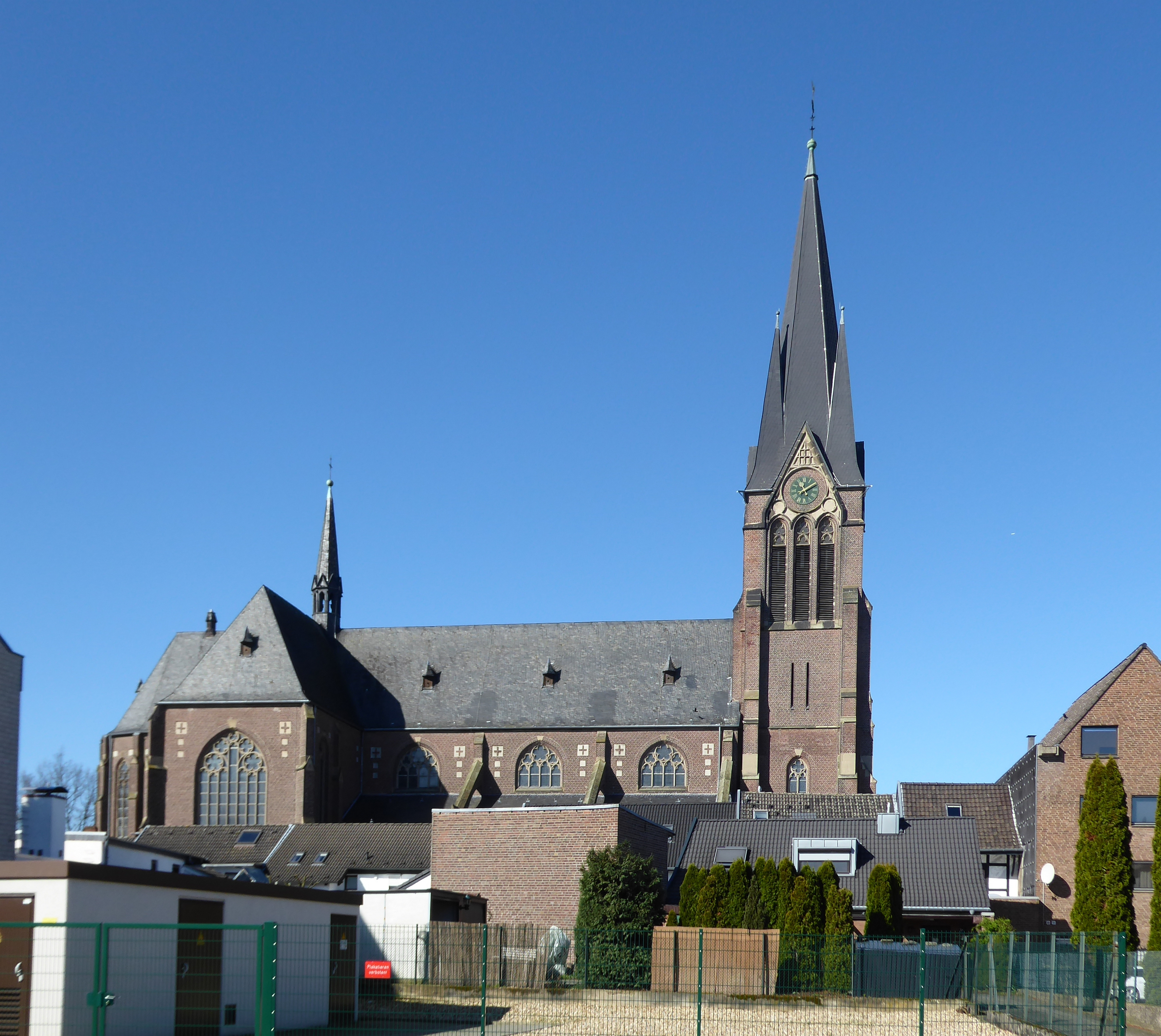 St. Gereon (Giesenkirchen)